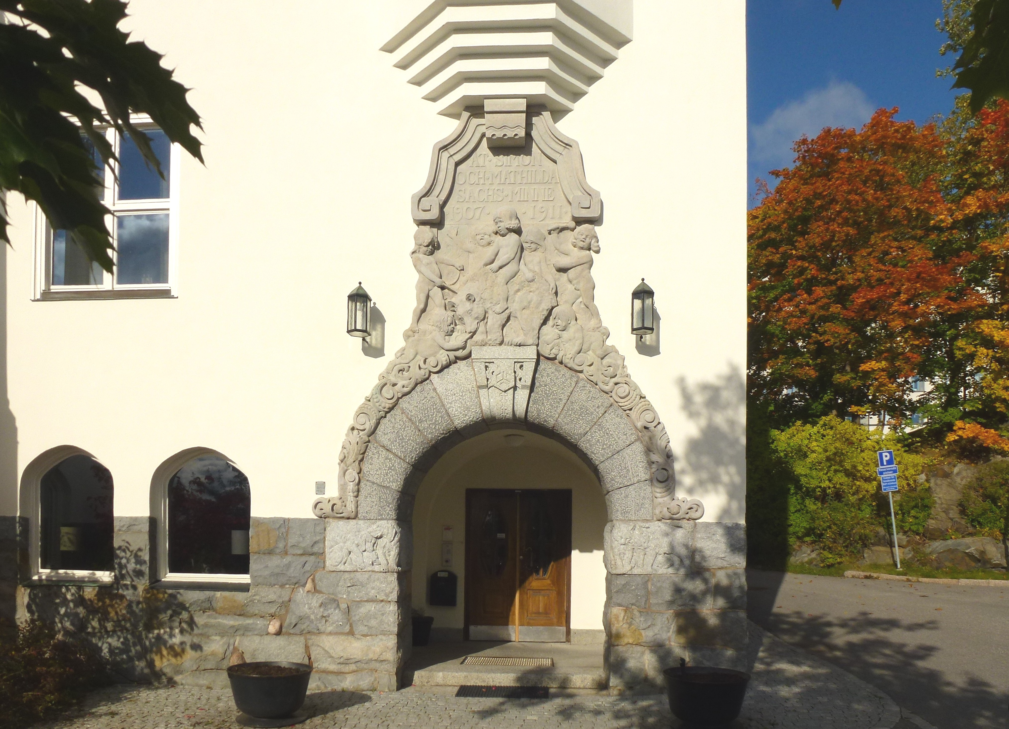 Sachsska barnsjukhuset, portalomfattning, formgiven av Hjördis Nordin-Tengbom